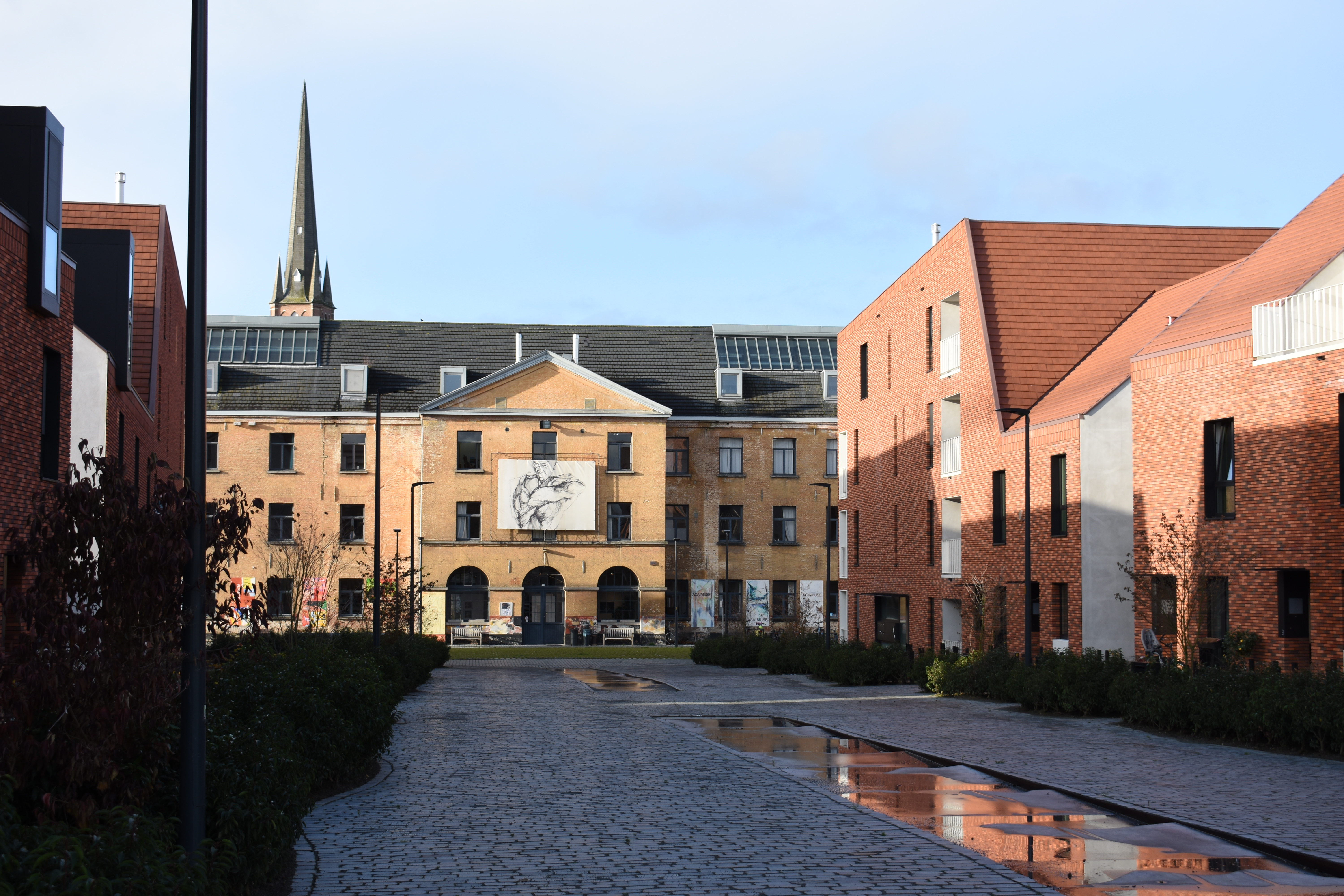 SASK in Sionsite: Stedelijke Academie op de achtergrond, geïntegreerd in de nieuwe Sionsite (P.J. Denisstraat).